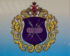 Эмблема ГЦ РКО